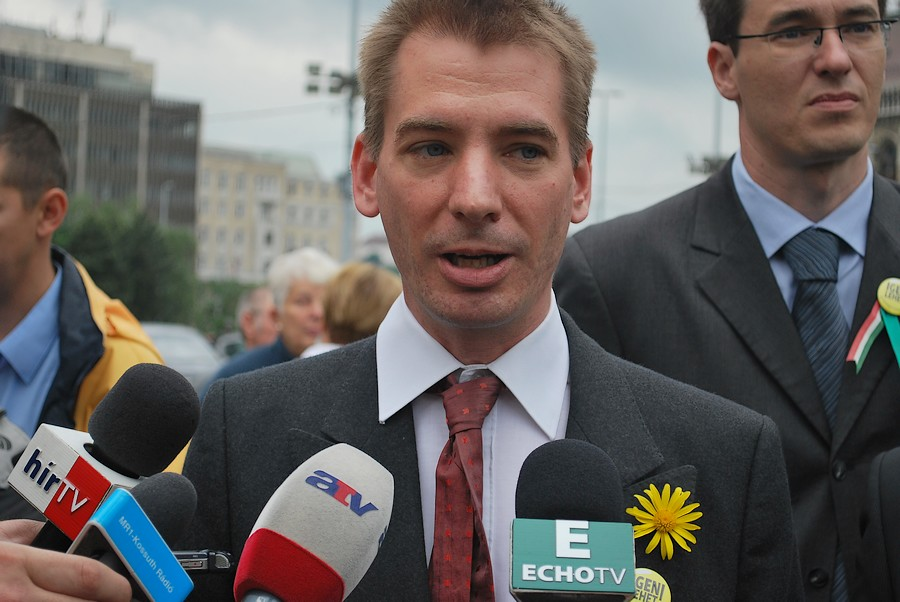 Jávor Benedek nyilatkozik. A háttérben Karácsony Gergely.